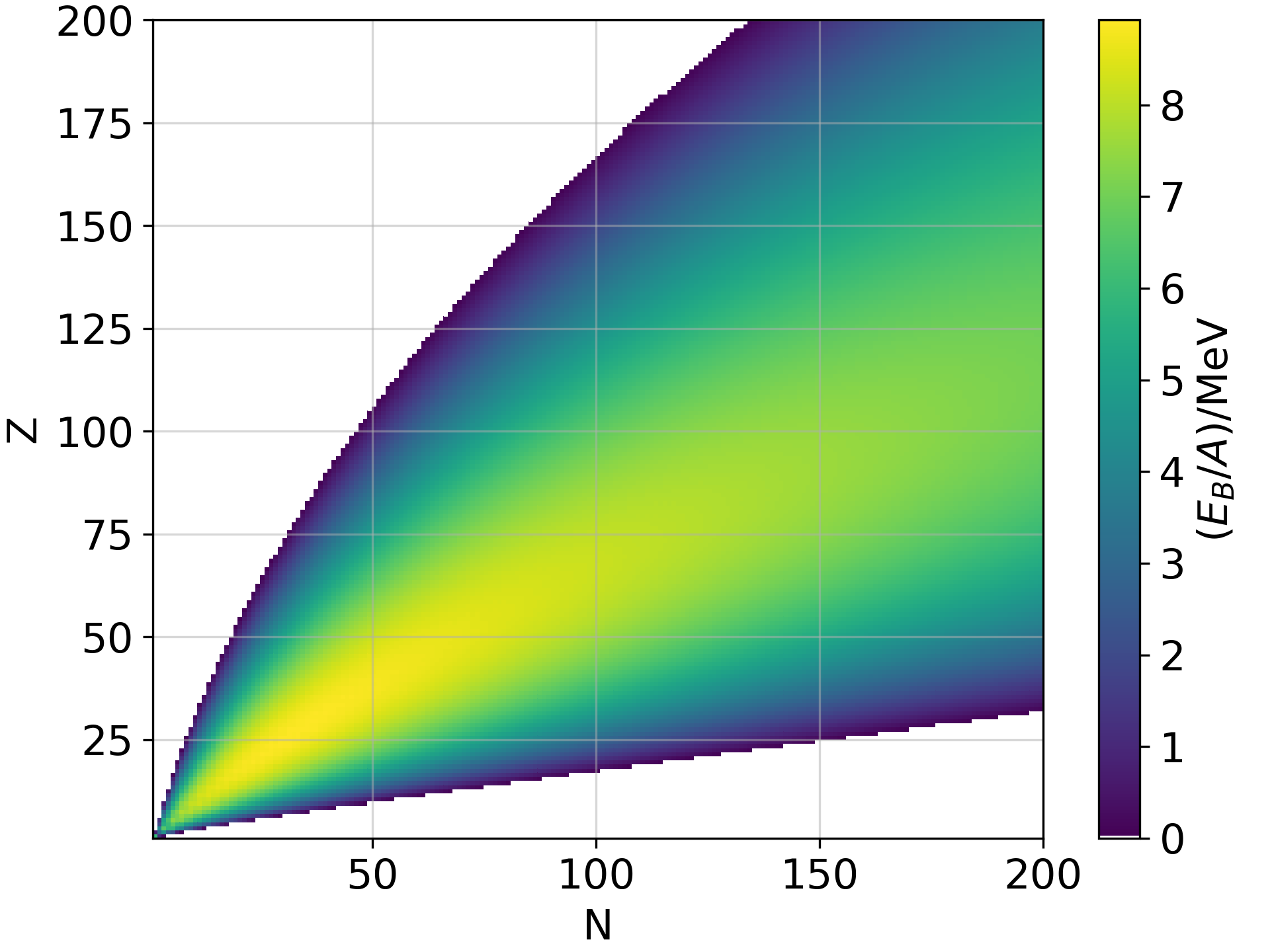 Bindungsenergie pro Nukleon mithilfe der Bethe-Weizsäcker-Formel im Bereich Z, N = [1, 200] .